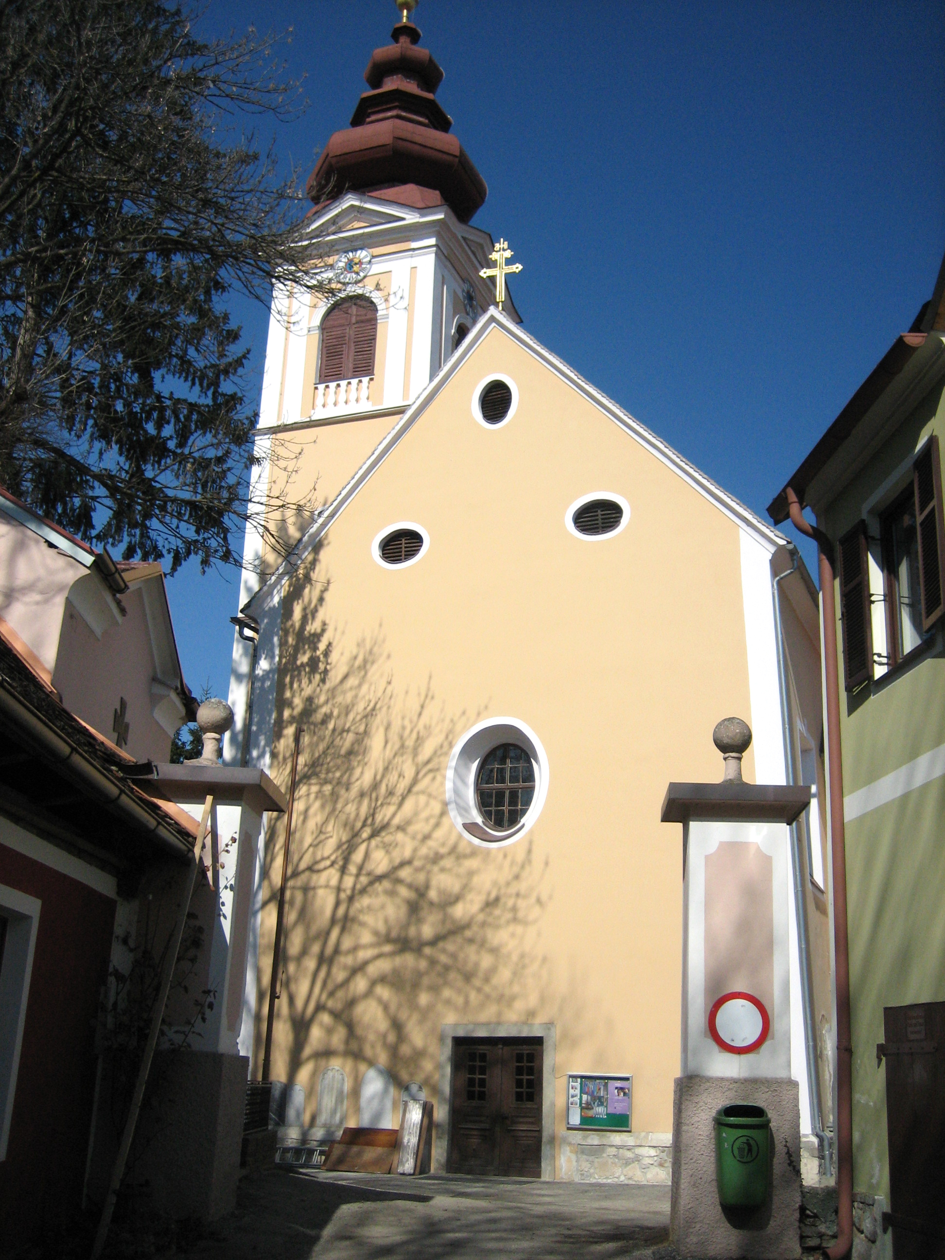 Kath. Pfarrkirche Allerheiligen und Kirchhofportal, Allerheiligen bei Wildon